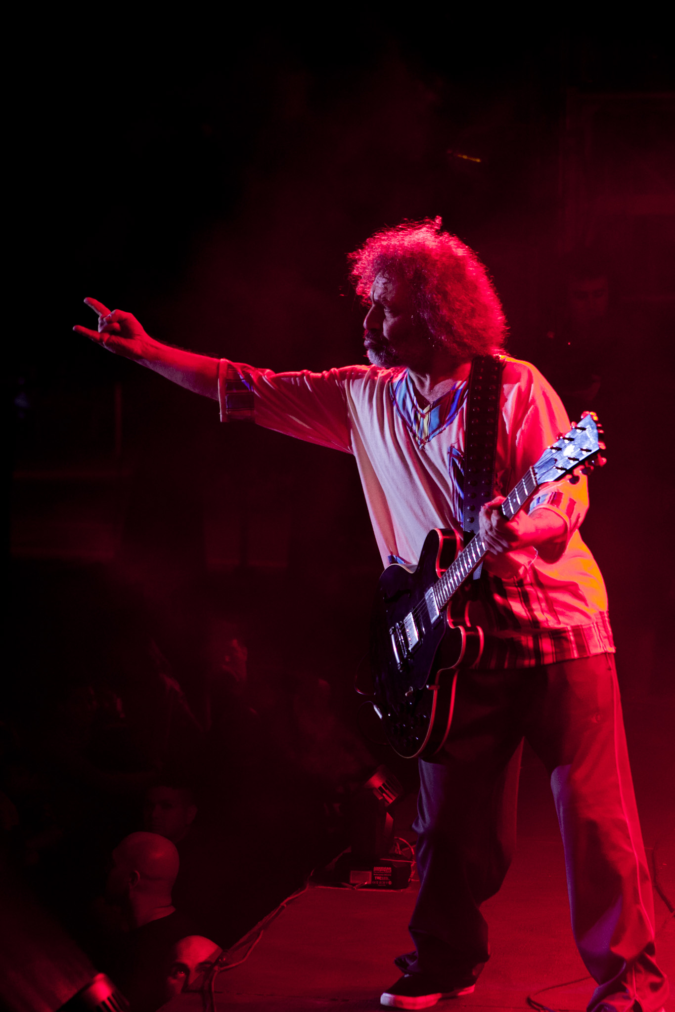 El guitarrista Oscar Righi en 2015.